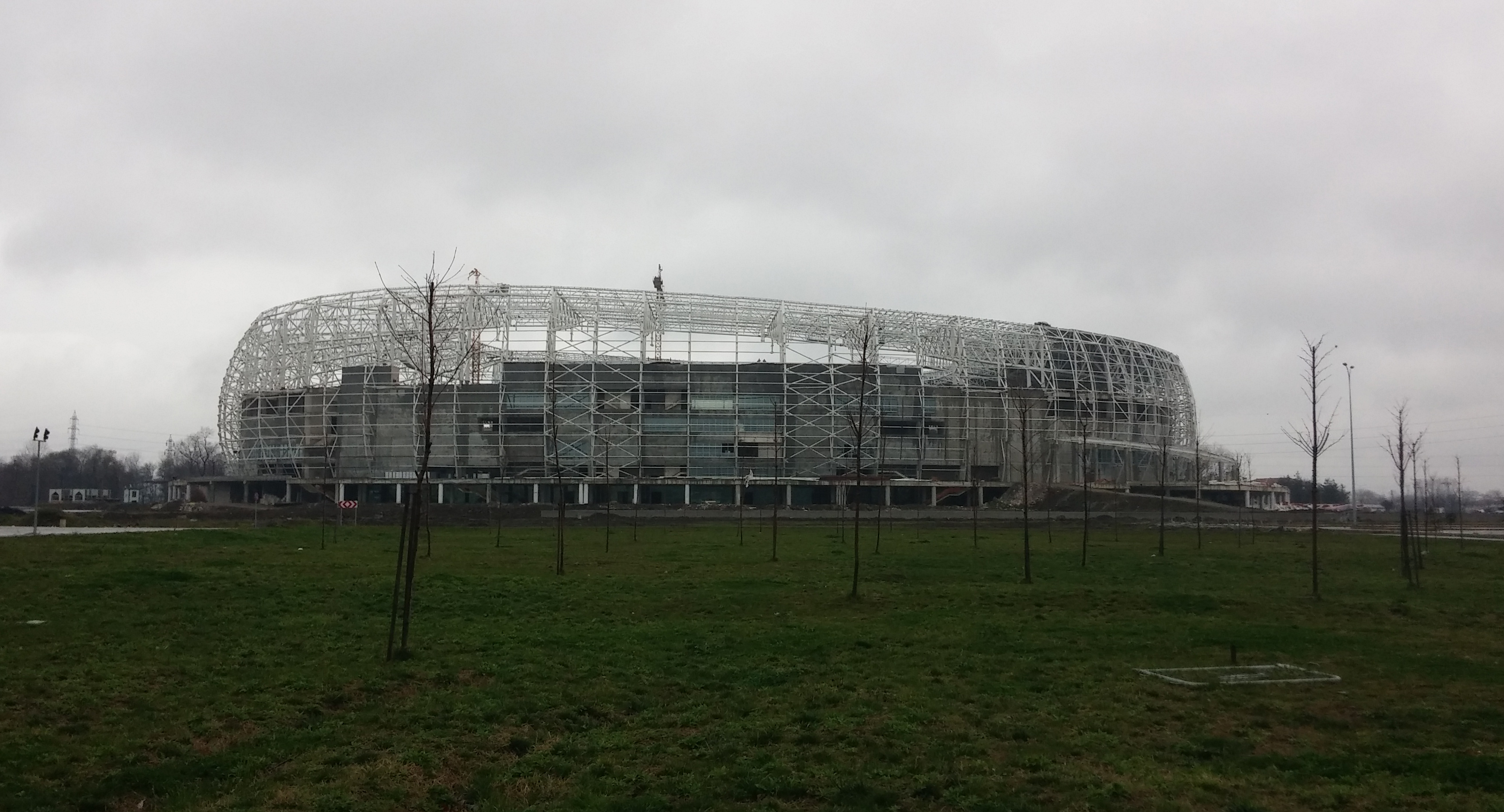 Stadyum Samsun'un inşa aşamasındayken çekilen bir fotoğrafı.